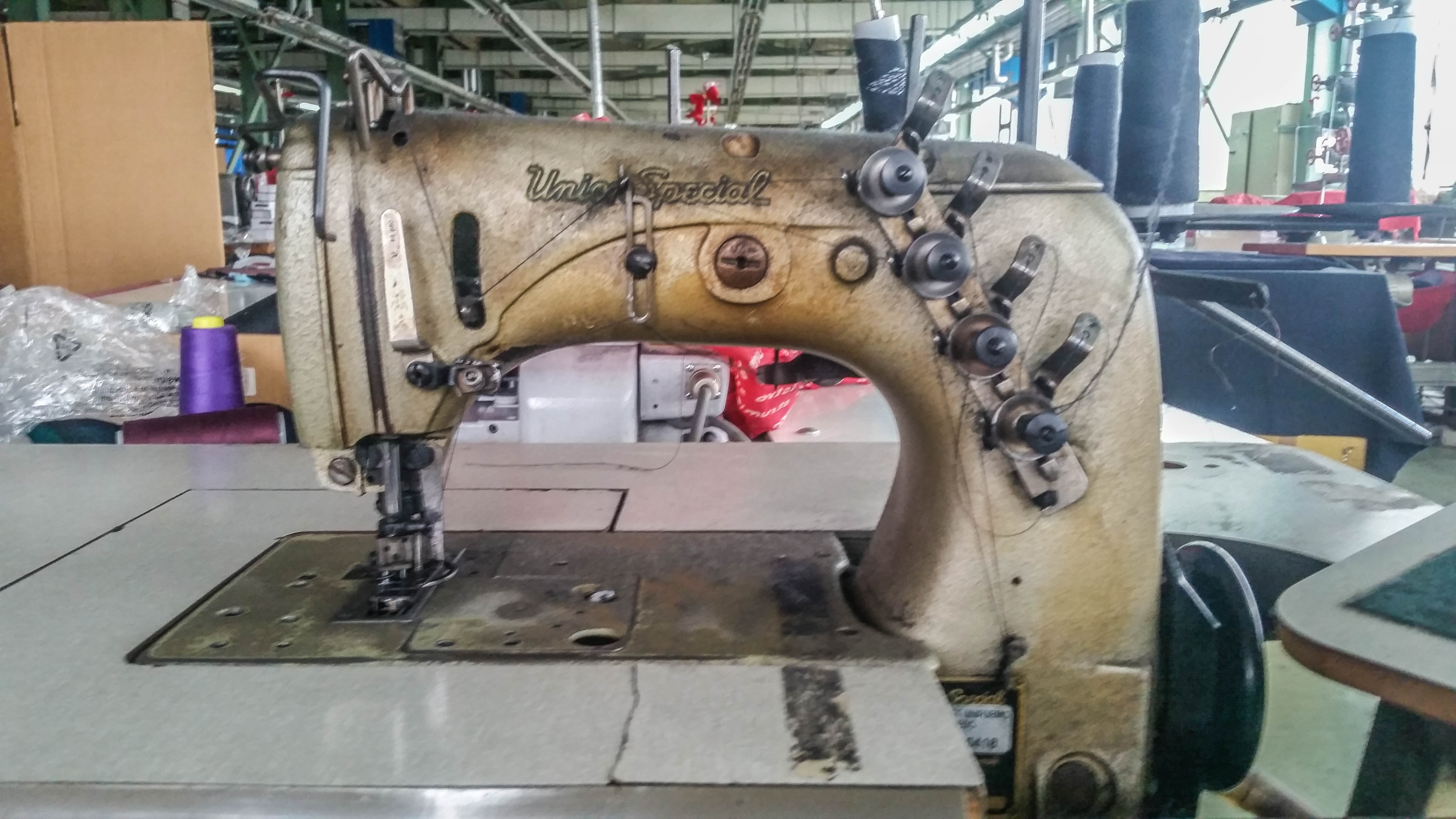 Индустриска машина за шиење Union Special